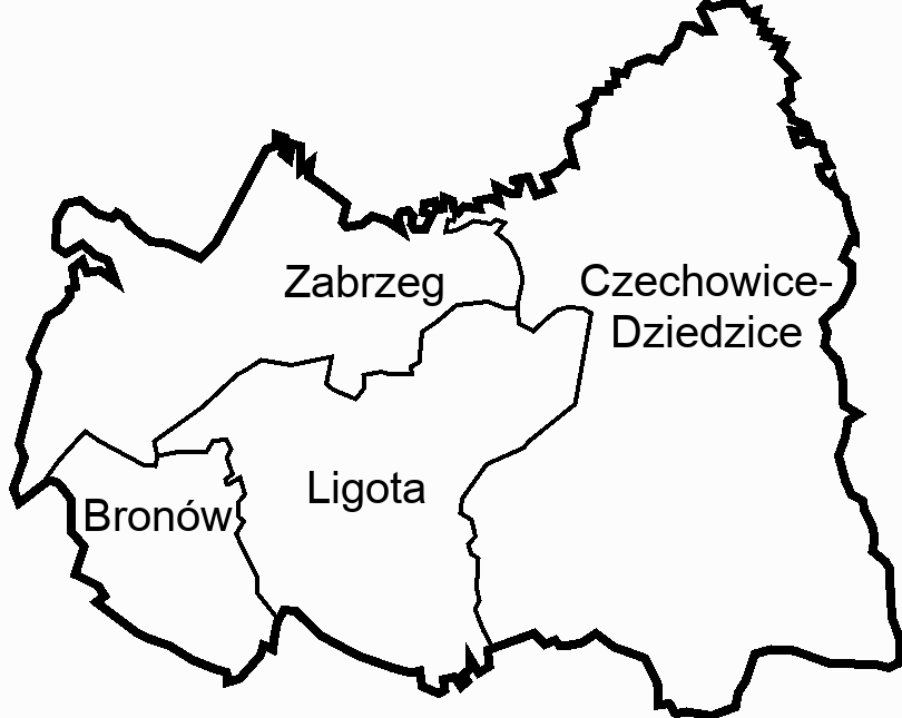 Podział gminy Czechowice-Dziedzice na miasto i sołectwa